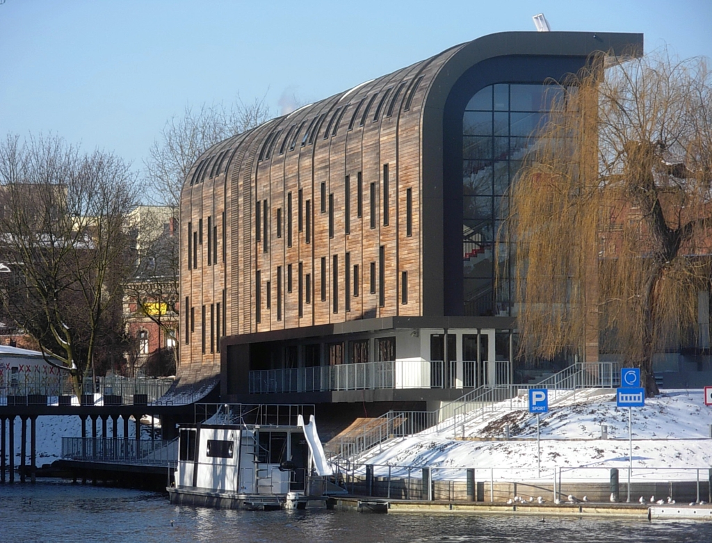 Przystań Bydgoszcz na Wyspie Młyńskiej